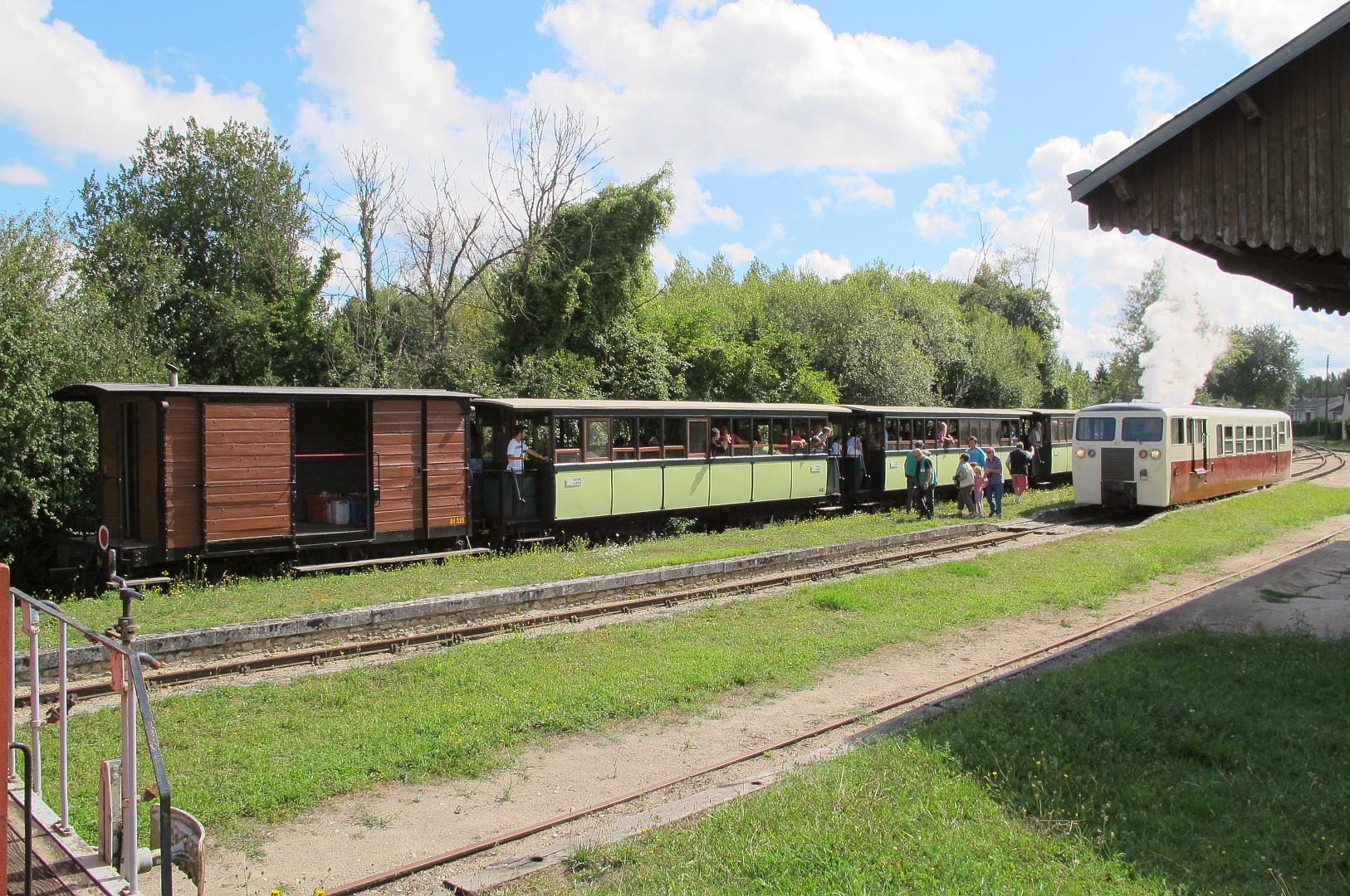 Croisement entre deux trains en gare de Pellevoisin (Indre) le 23 août 2015.